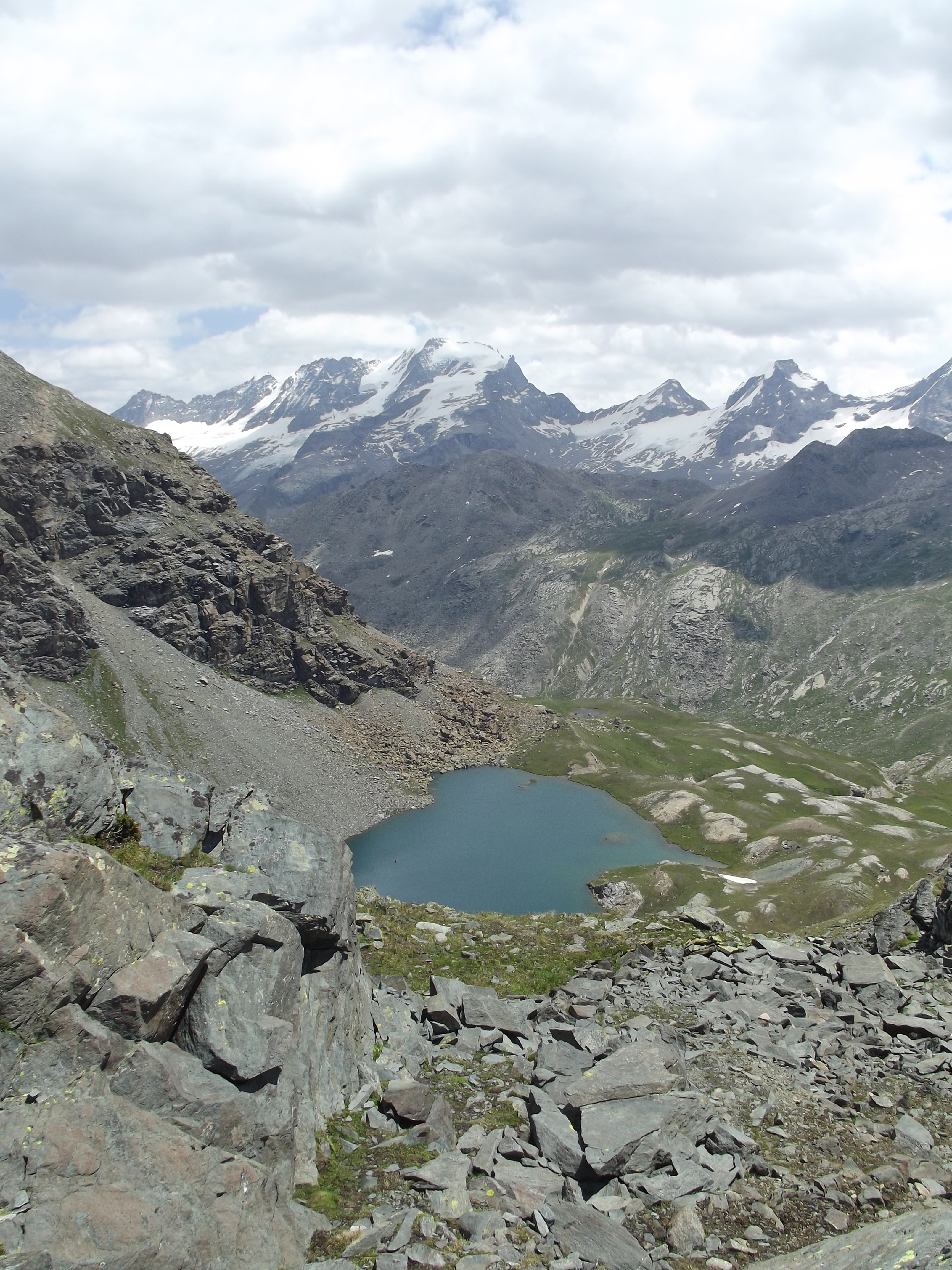 Gran Paradiso This is a photo of a monument which is part of cultural heritage of Italy.